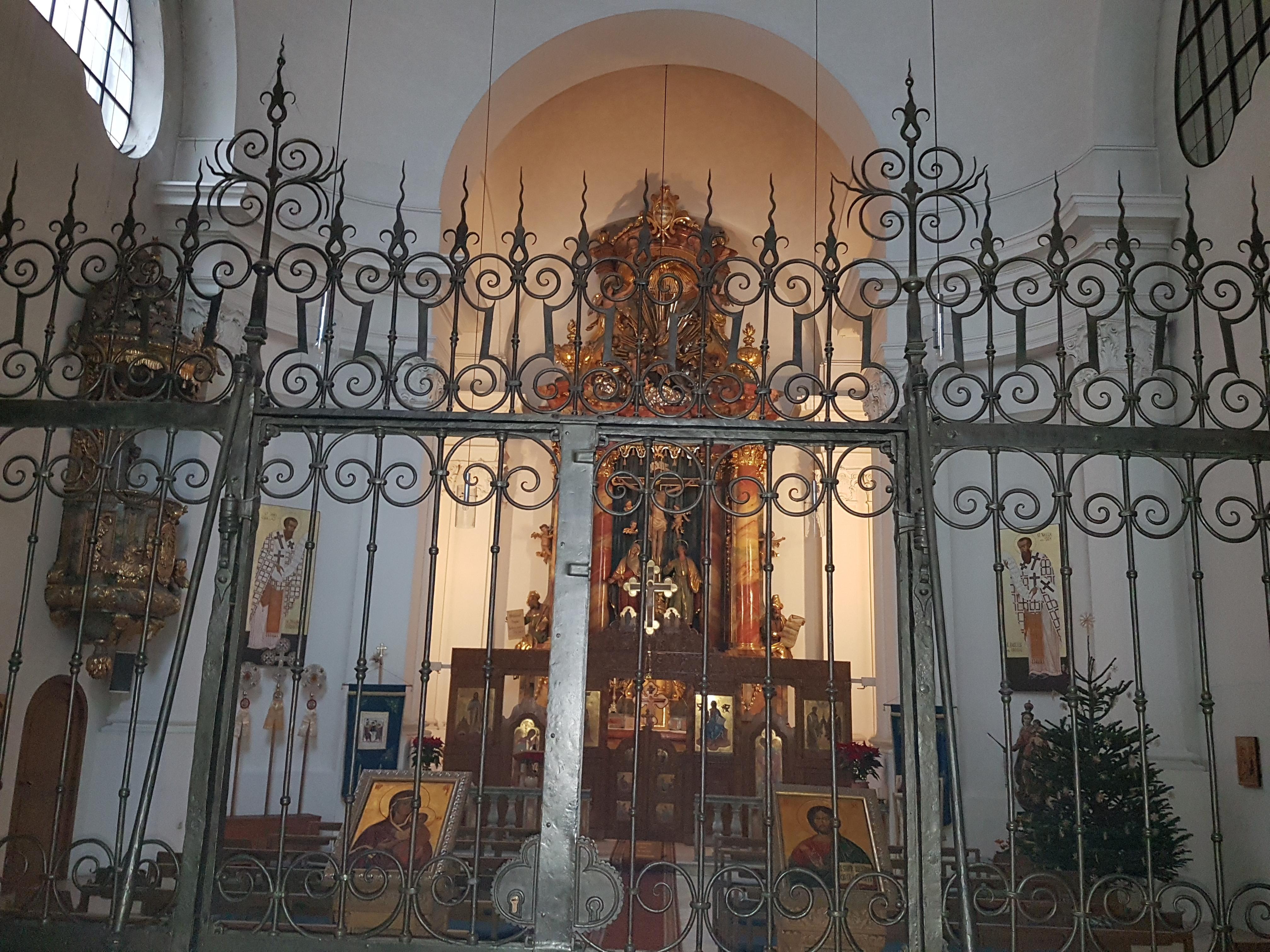 München, St. Elisabeth (Klinikviertel), gesamter Innenraum mit Abschlussgitter.